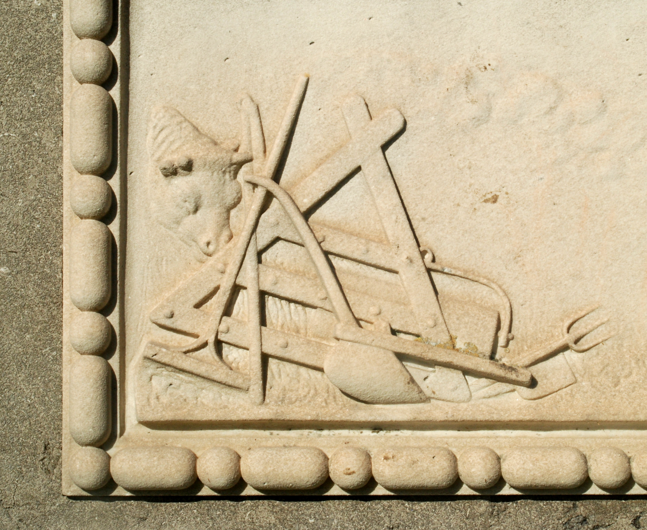 Belgique - Brabant wallon - Nivelles - Eglise Sainte-Marguerite de Thines